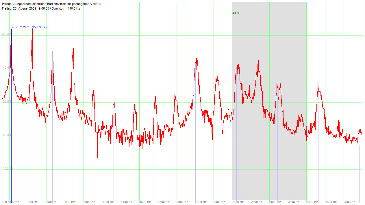 Von einem ausgebildeten Bariton gesungener Vokal u